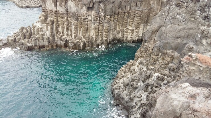 조선말: 제주도의 주상절리 모습을 촬영함.